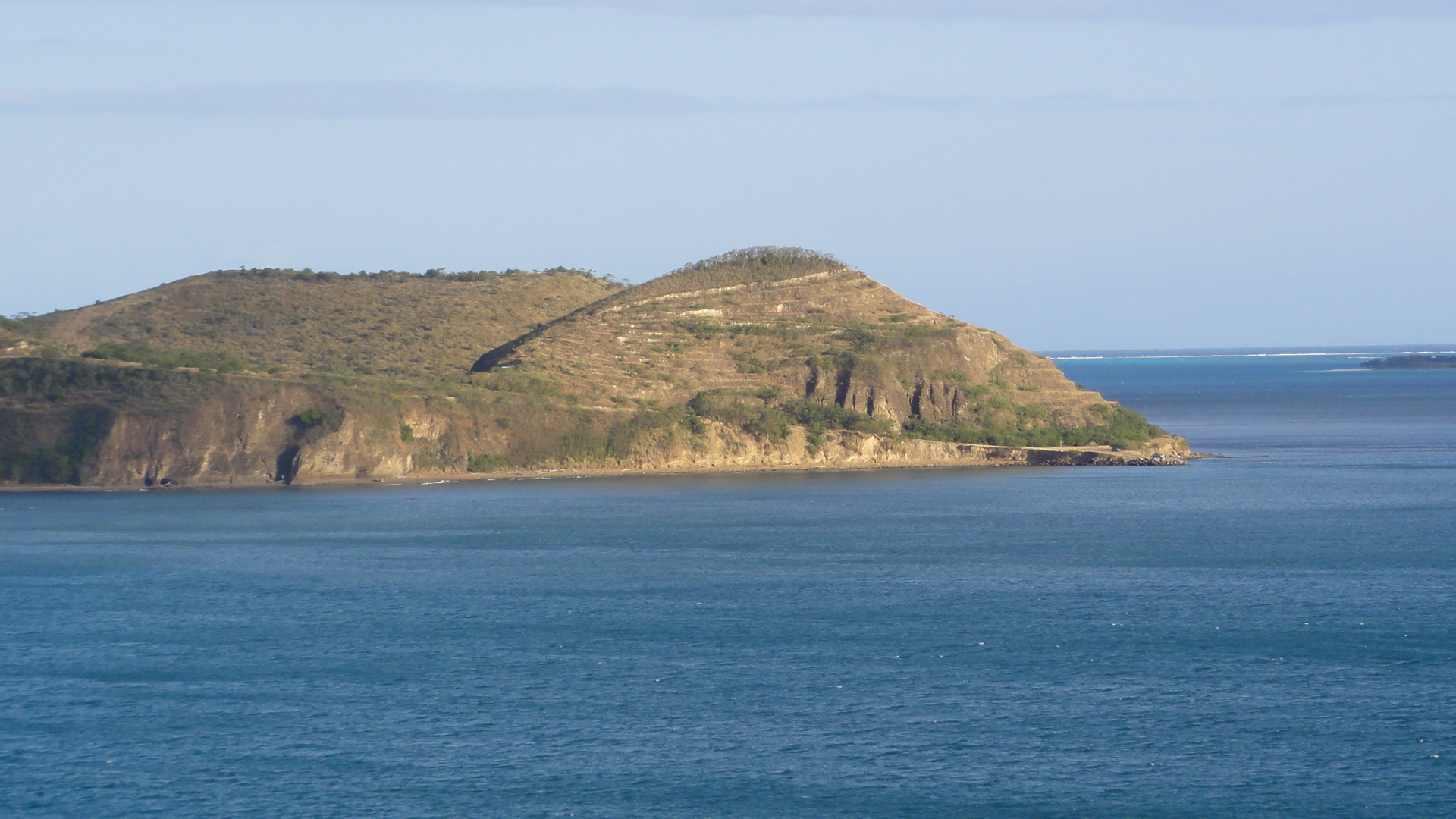 Pointe Vidoine